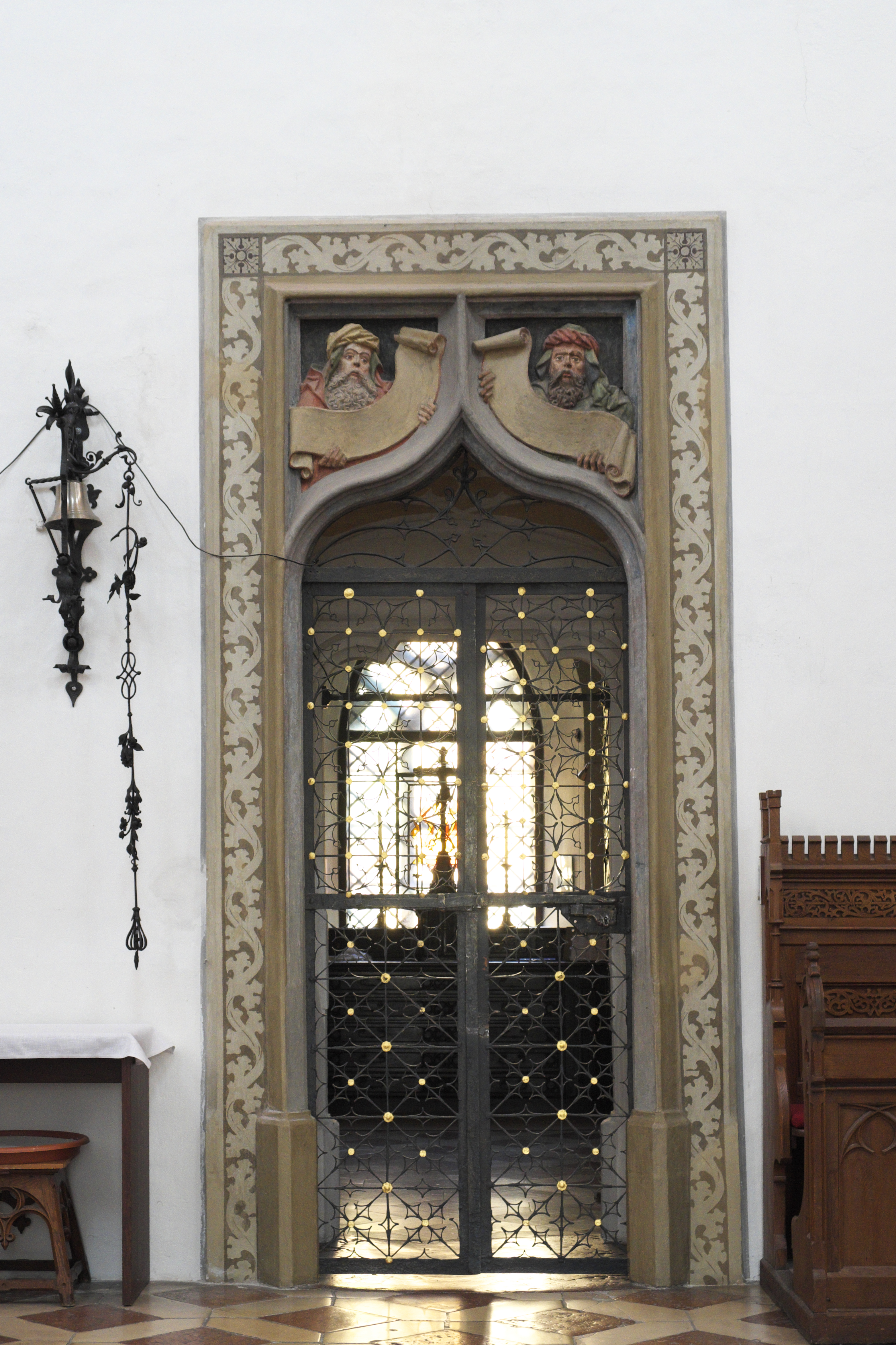 Katholische Pfarrkirche St. Jodok in Landshut (Bayern/Deutschland), Tür zur Sakristei mit Prophetenköpfen und Spruchbändern, von 1482